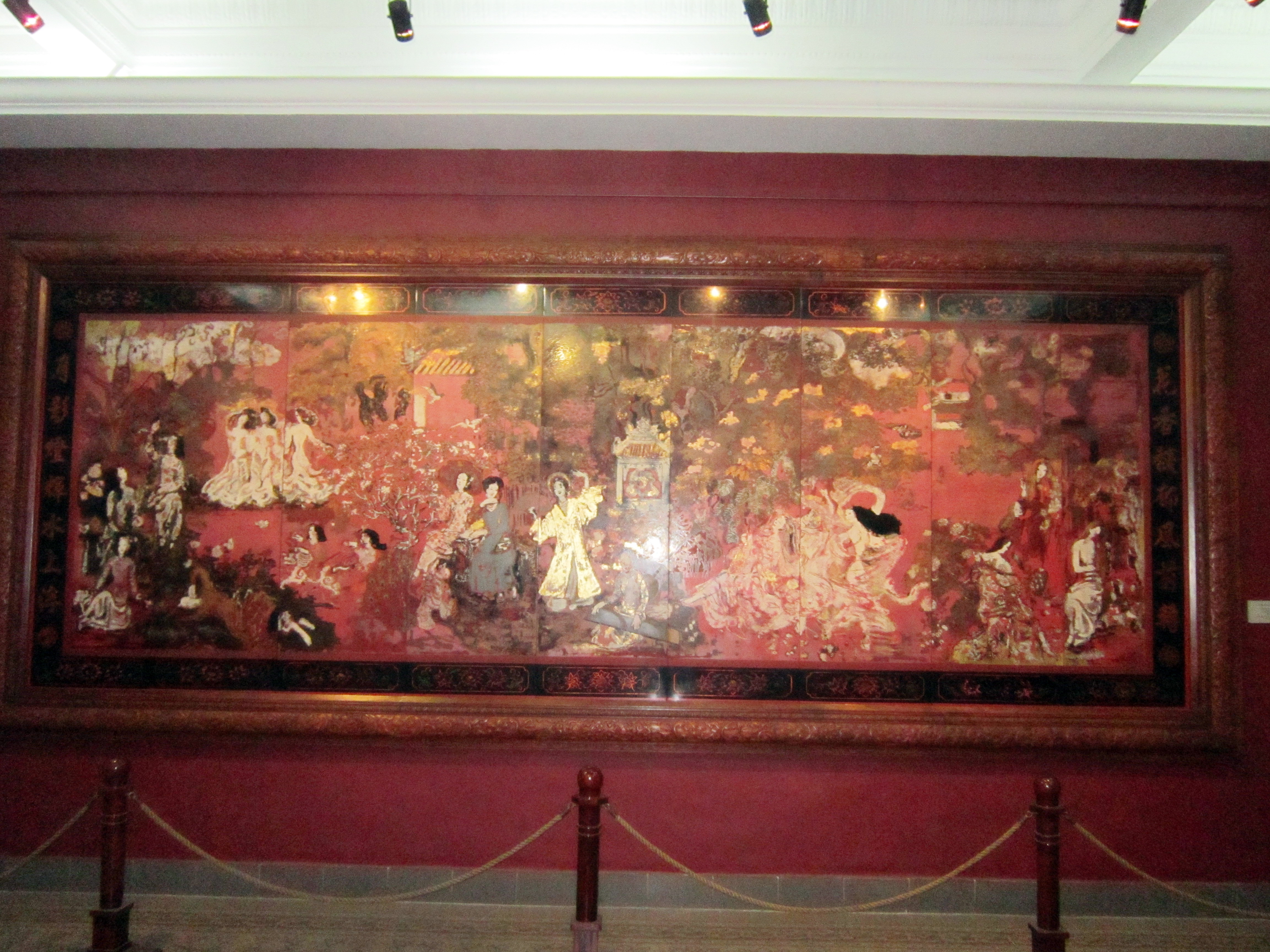 Tranh sơn mài “Vườn xuân Bắc Trung Nam” của danh họa Nguyễn Gia Trí trong Bảo tàng Mỹ thuật Thành phố Hồ Chí Minh.